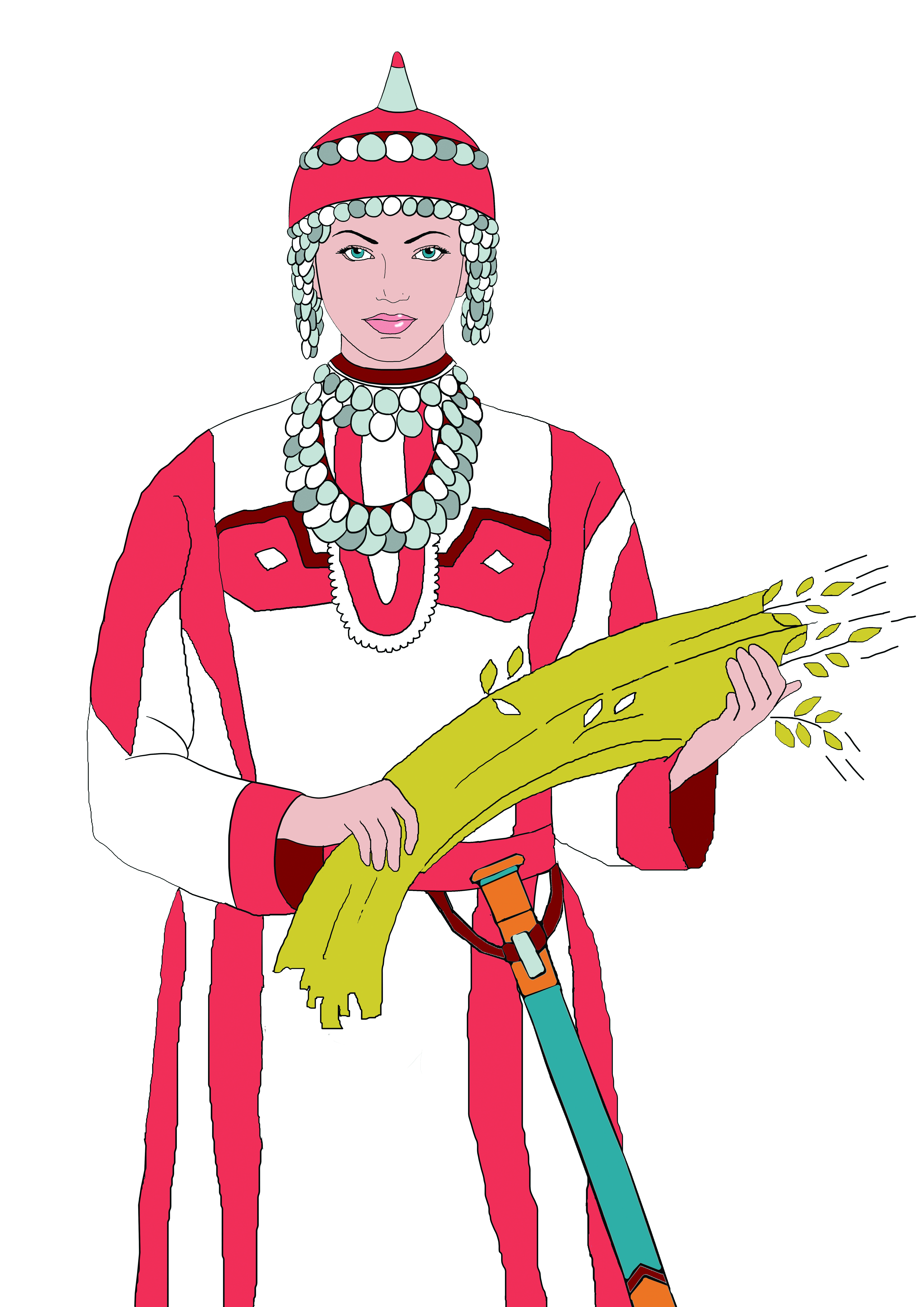 Чӑвашла: Эмине герб валли конкурс çине хутшăннă